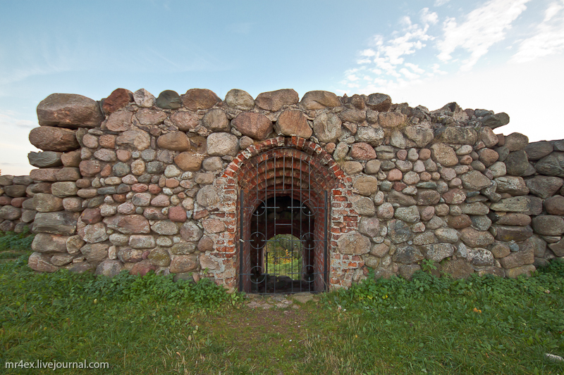 Руіна. Навагрудскі замак